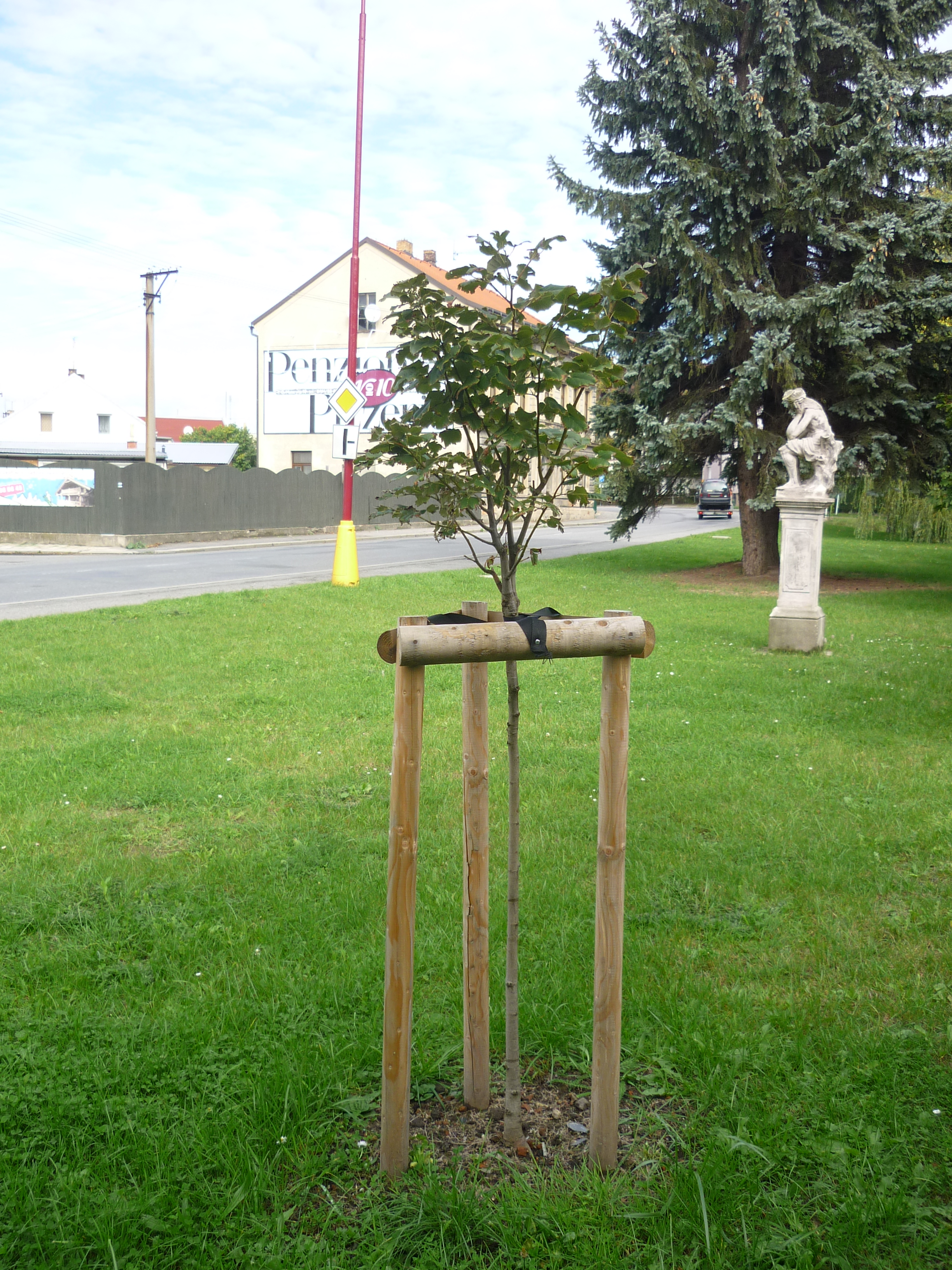 Esperanto-arbo en Svitavy (tilio) plantita dum internacai konferenco OSIEK 2012